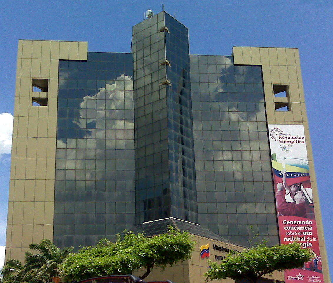 Edificio principal de PDVSA ubicado en la Av. 5 de Julio, Ciudad de Maracaibo, Venezuela.